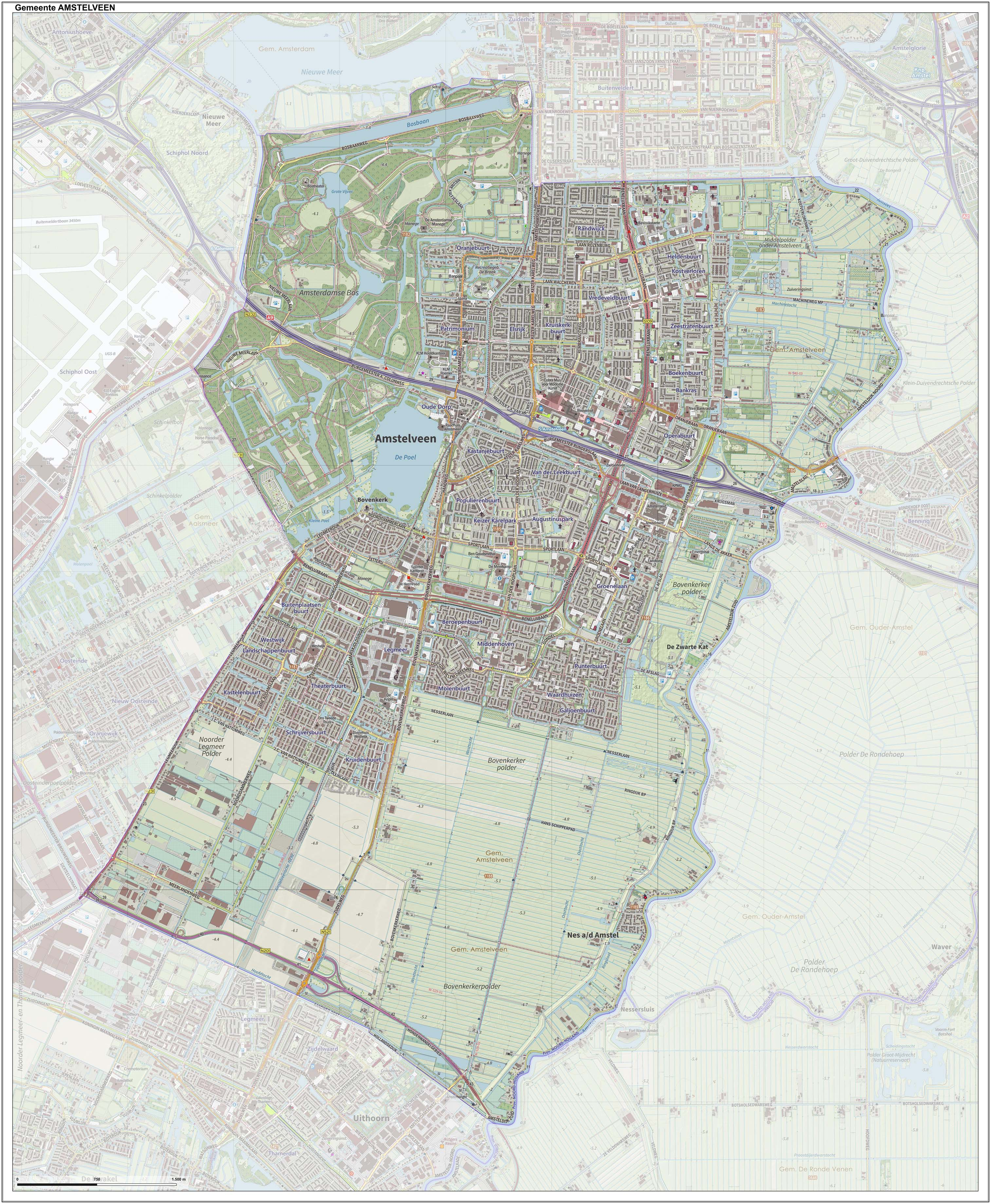 Topografische gemeentekaart. Resolutie: 400 pixels/km. Kaartbeeld samengesteld uit de open geodata van de Top10NL en Top25namen (Kadaster), Creative Commons-BY licentie. Gebouwvlakken uit open geodata BAG extract. Wegen uit de OpenStreetMap, OpenStreetMap community. Reliëfschaduw uit de Actuele Hoogtekaart AHN2. Samenstelling en kleurenschema: Jan-Willem van Aalst, met QGIS. Zie ook de Legenda.